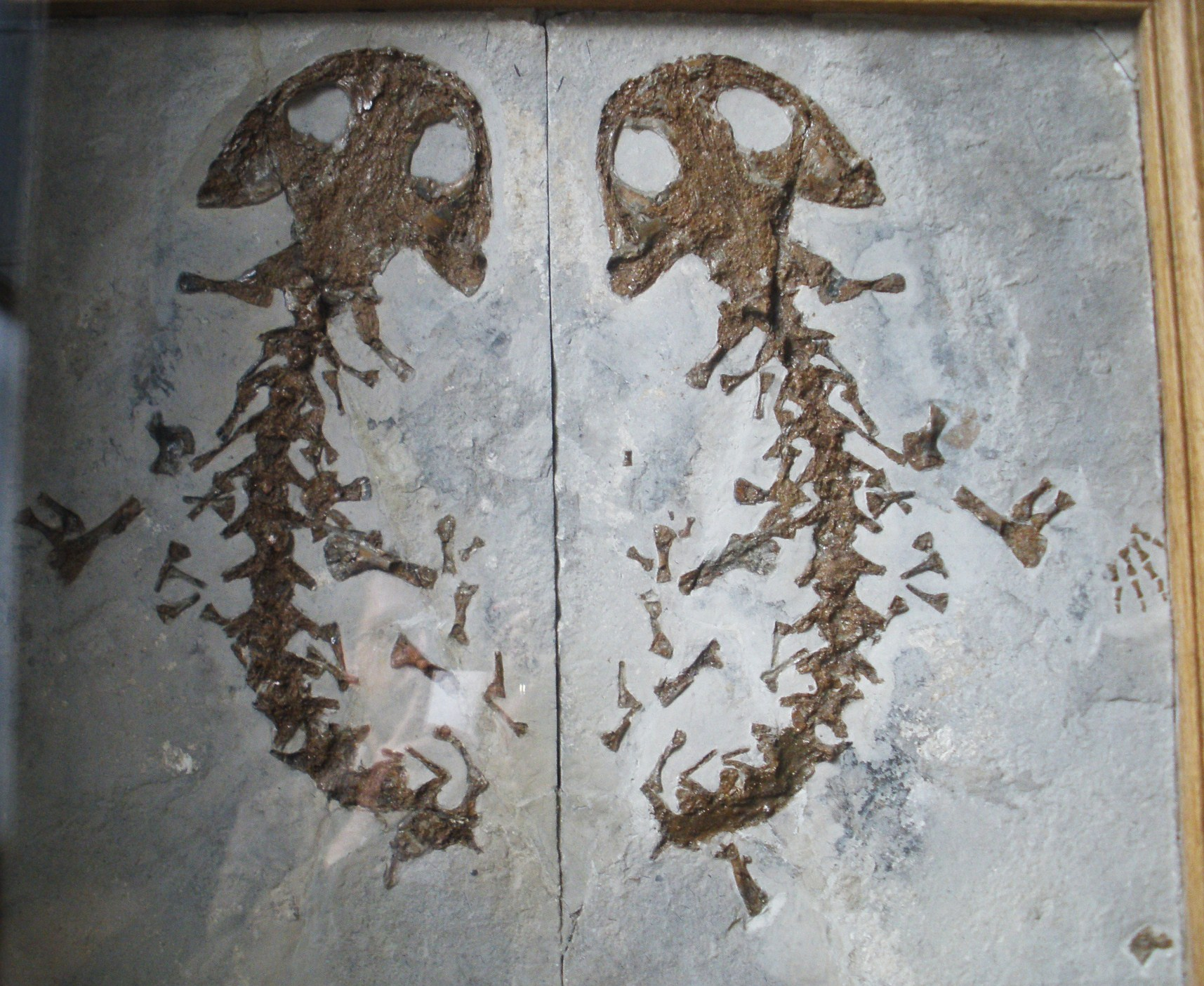 Fossil of Andrias, an extinct salamander - Took the photo at Teylers Museum, Haarlem